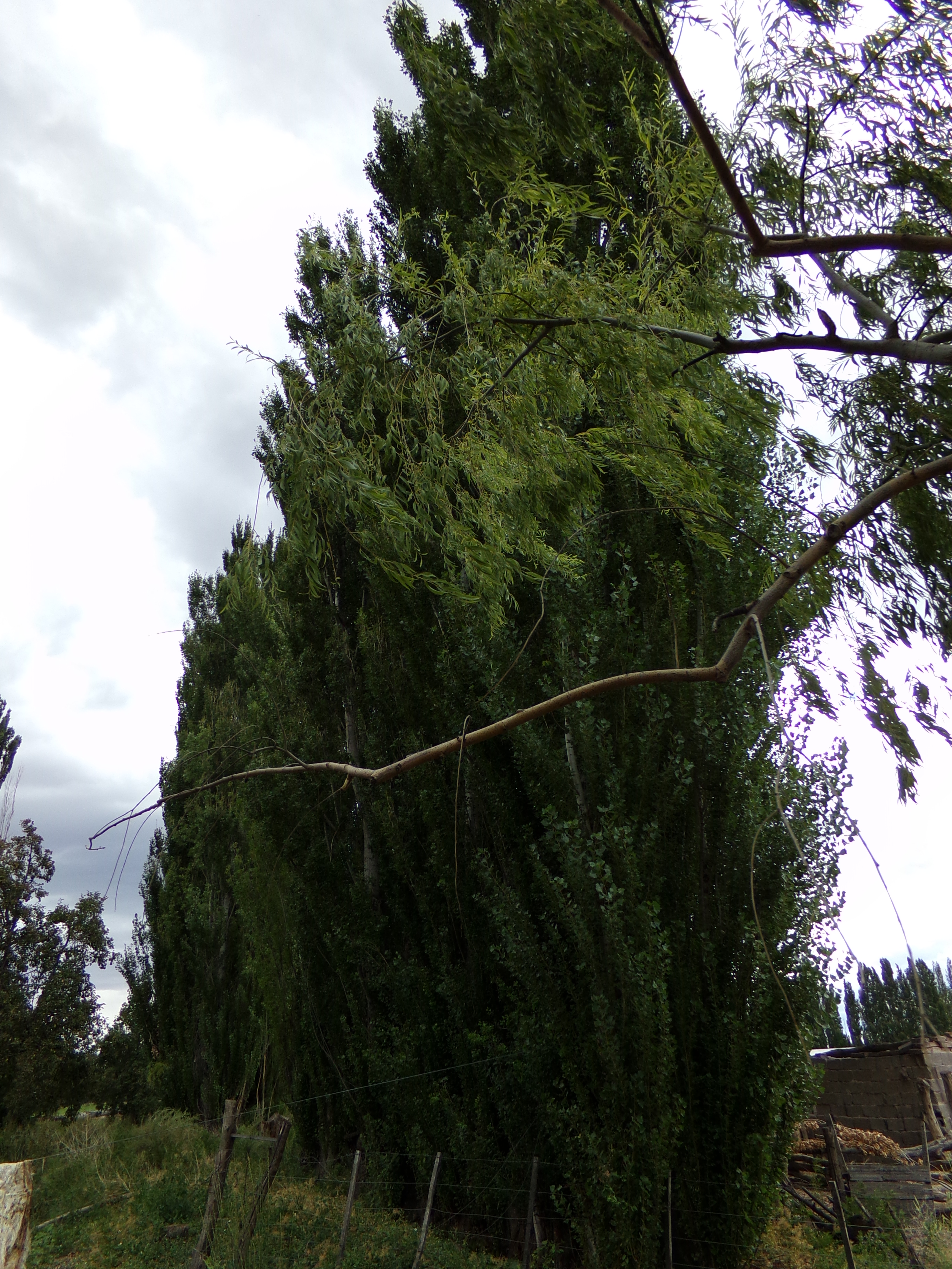 Árboles utilizados como cortinas rompevientos en Chubut, Argentina